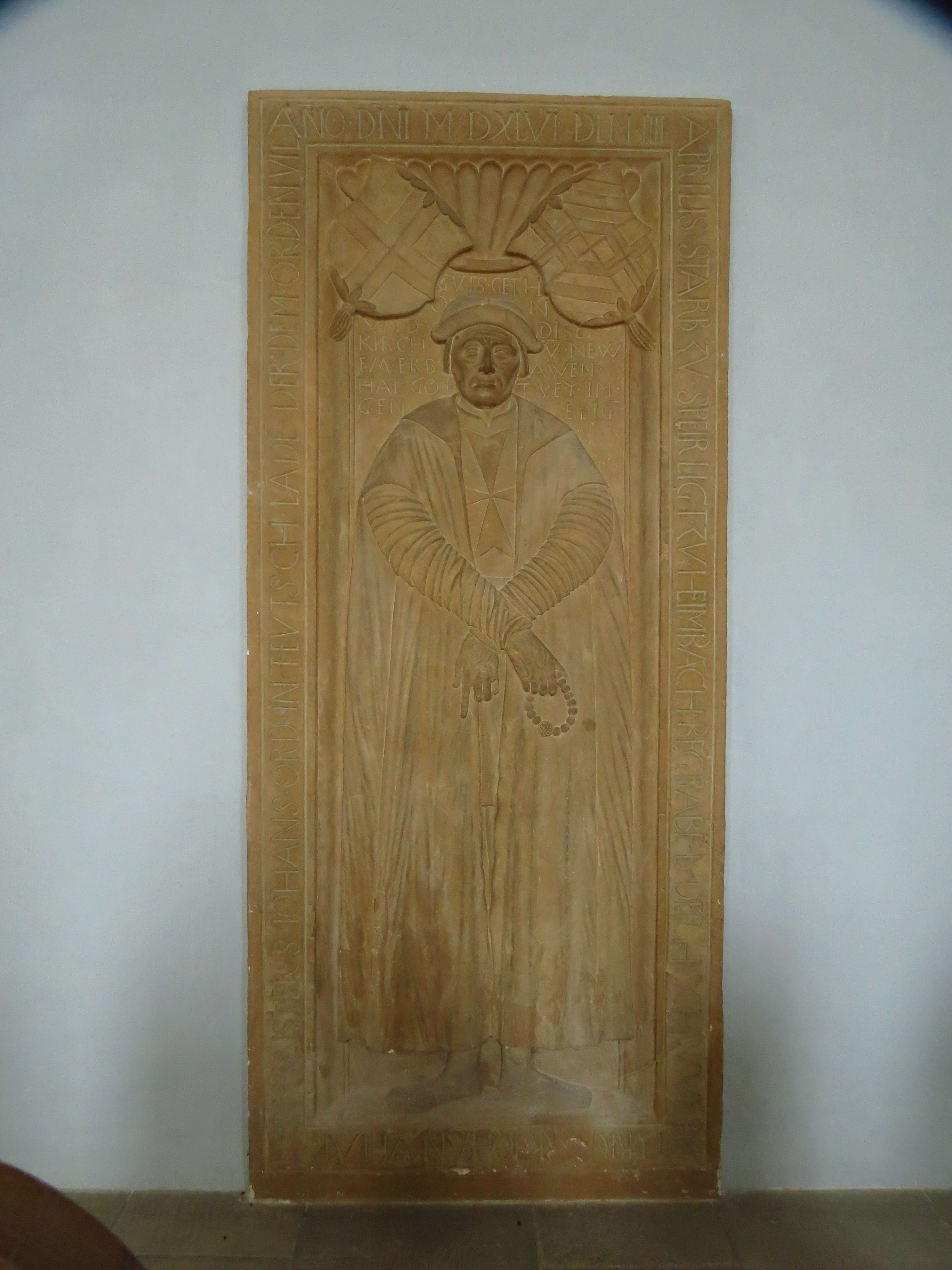 Grabplatte des Großpriors Johann von Hattstein in der Bartholomäus-Kirche in Heitersheim, Landkreis Breisgau-Hochschwarzwald, Baden-Württemberg